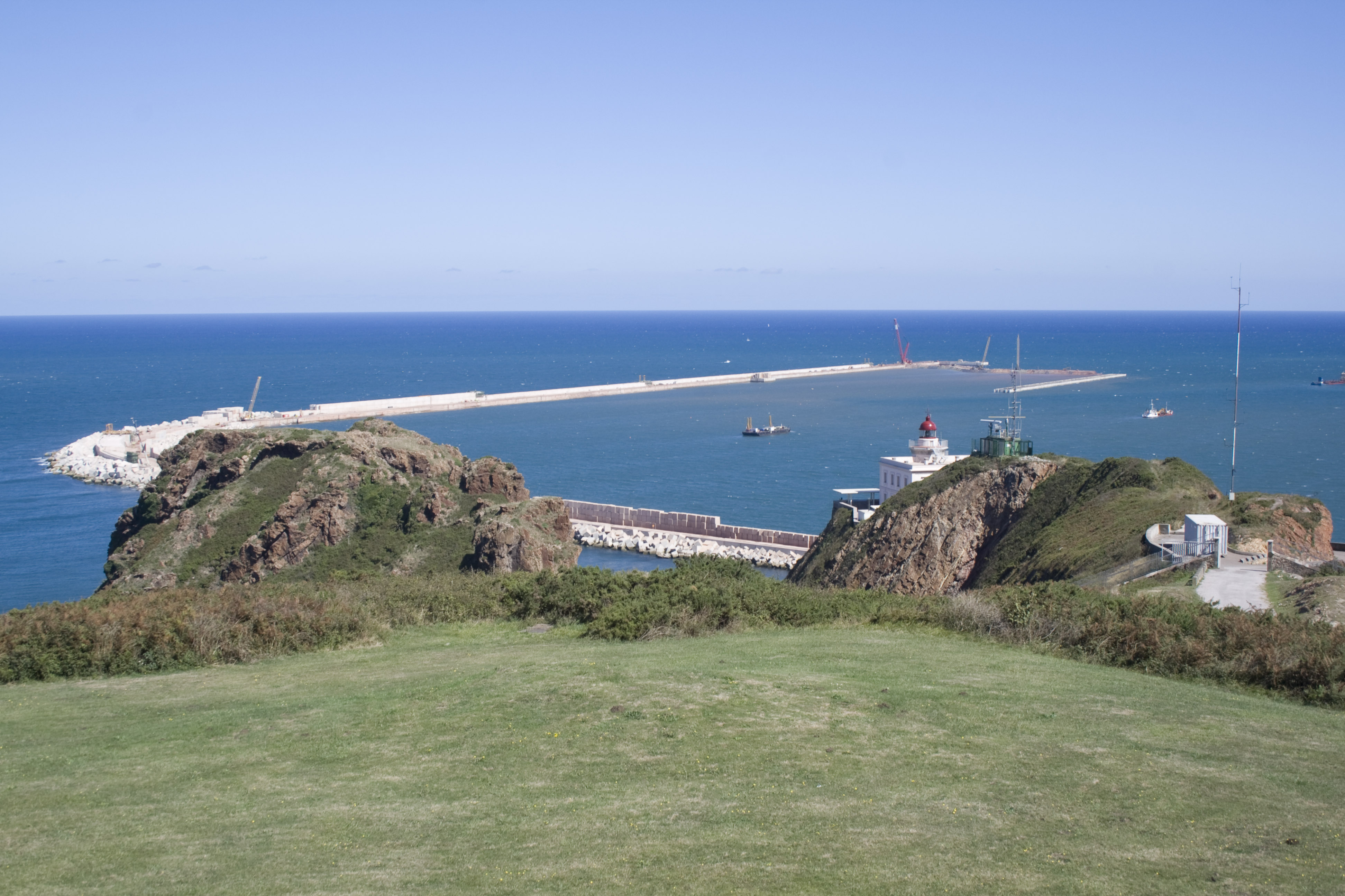 Estado del avance de las obras del nuevo dique de El Musel (septiembre 2008)